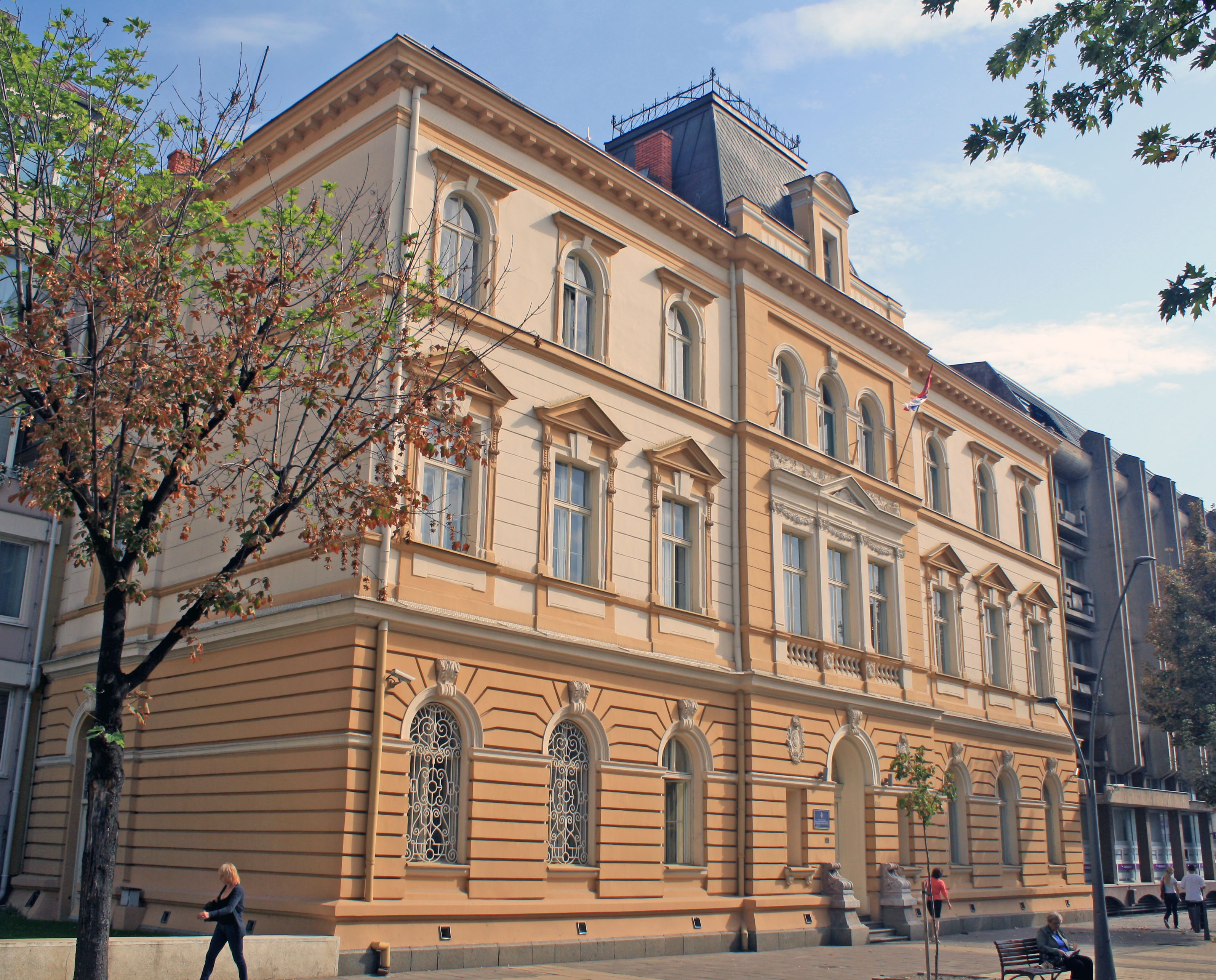 Некадашња Зграда Окружног начелства у Шапцу, данас Зграда Полицијске Управе у Шапцу.